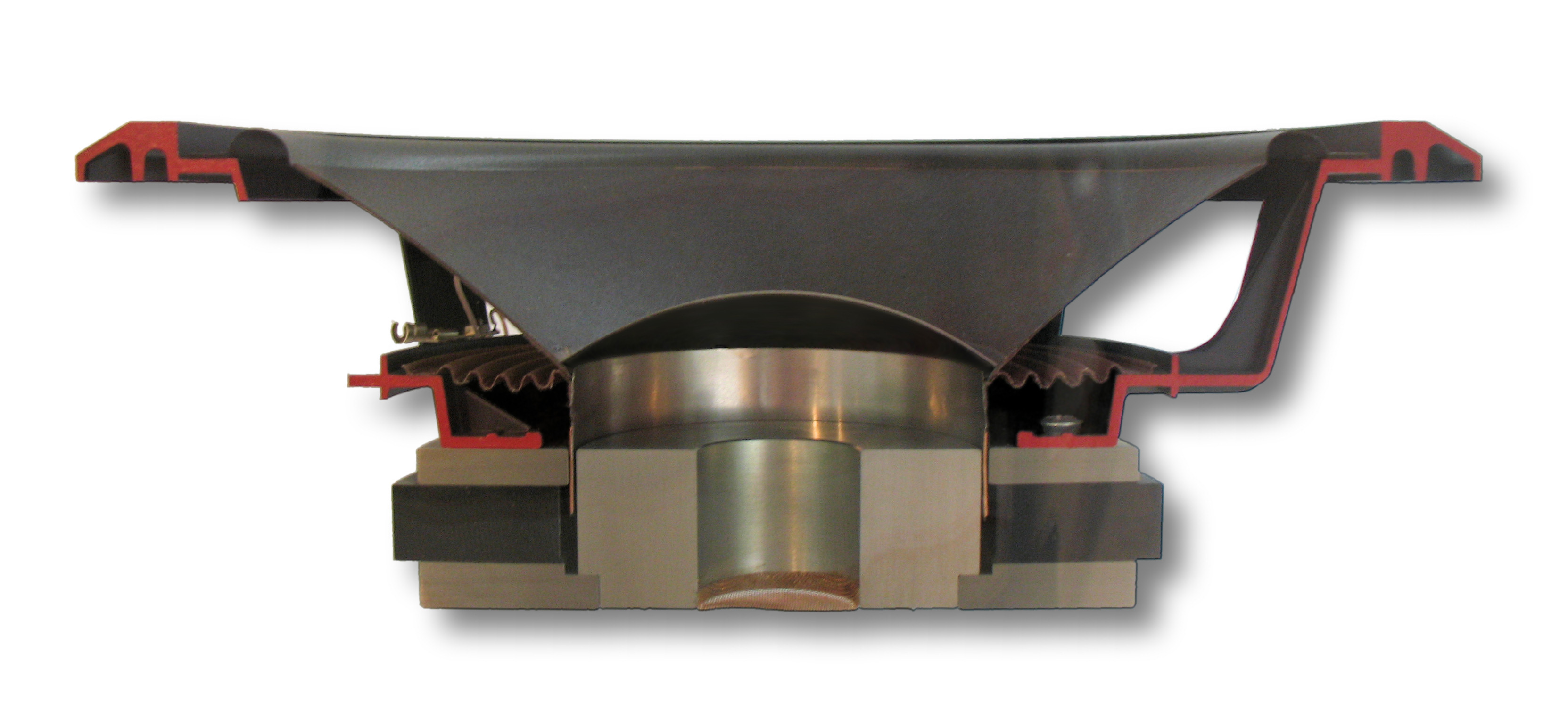 Elektrodynamischer Tiefton-Latsprecher PSL 320/400 S ISOPHON Elektroakustische Produktion GmbH, Berlin; 1989 Teilweise geschnittenes Original Aufgenommen in Deutschen Museum in München